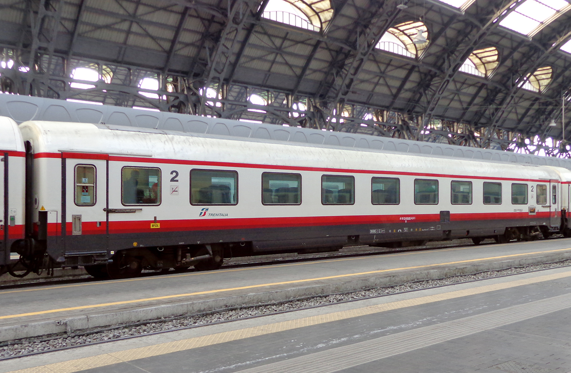 Carrozza 29-90 002 (tipo Gran Confort) delle Ferrovie dello Stato in livrea Frecciabianca, fotografata a Milano Centrale.